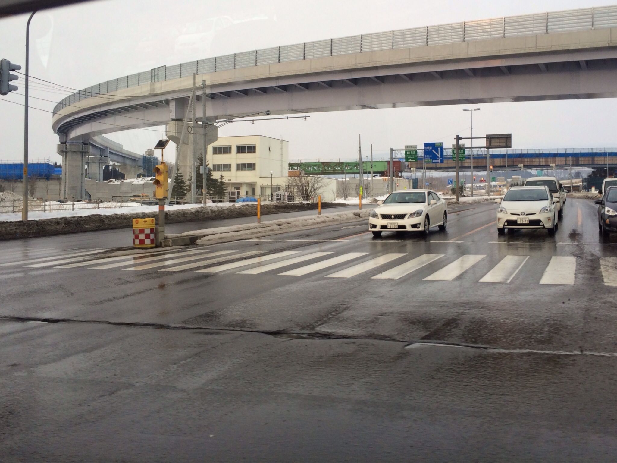 函館新外環状道路うのランプ橋(2014年1月）